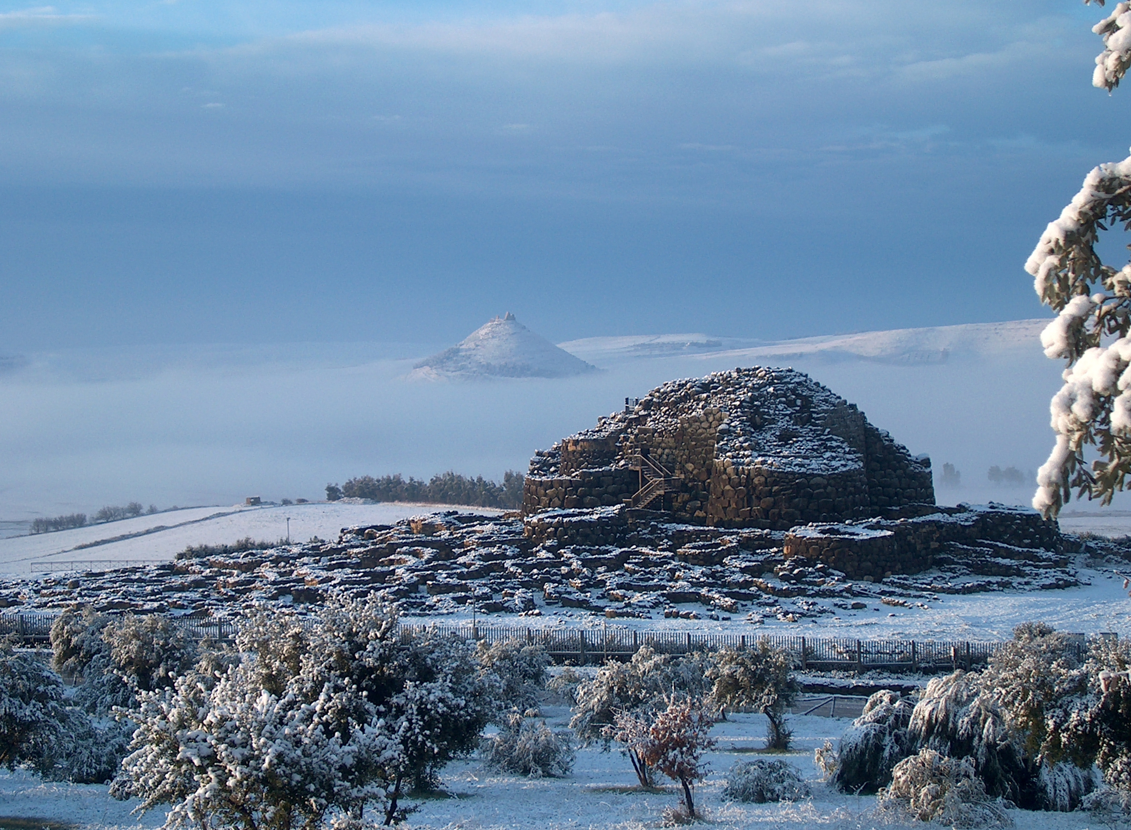 Complesso archeologico Su Nuraxi - MIBAC This is a photo of a monument which is part of cultural heritage of Italy.